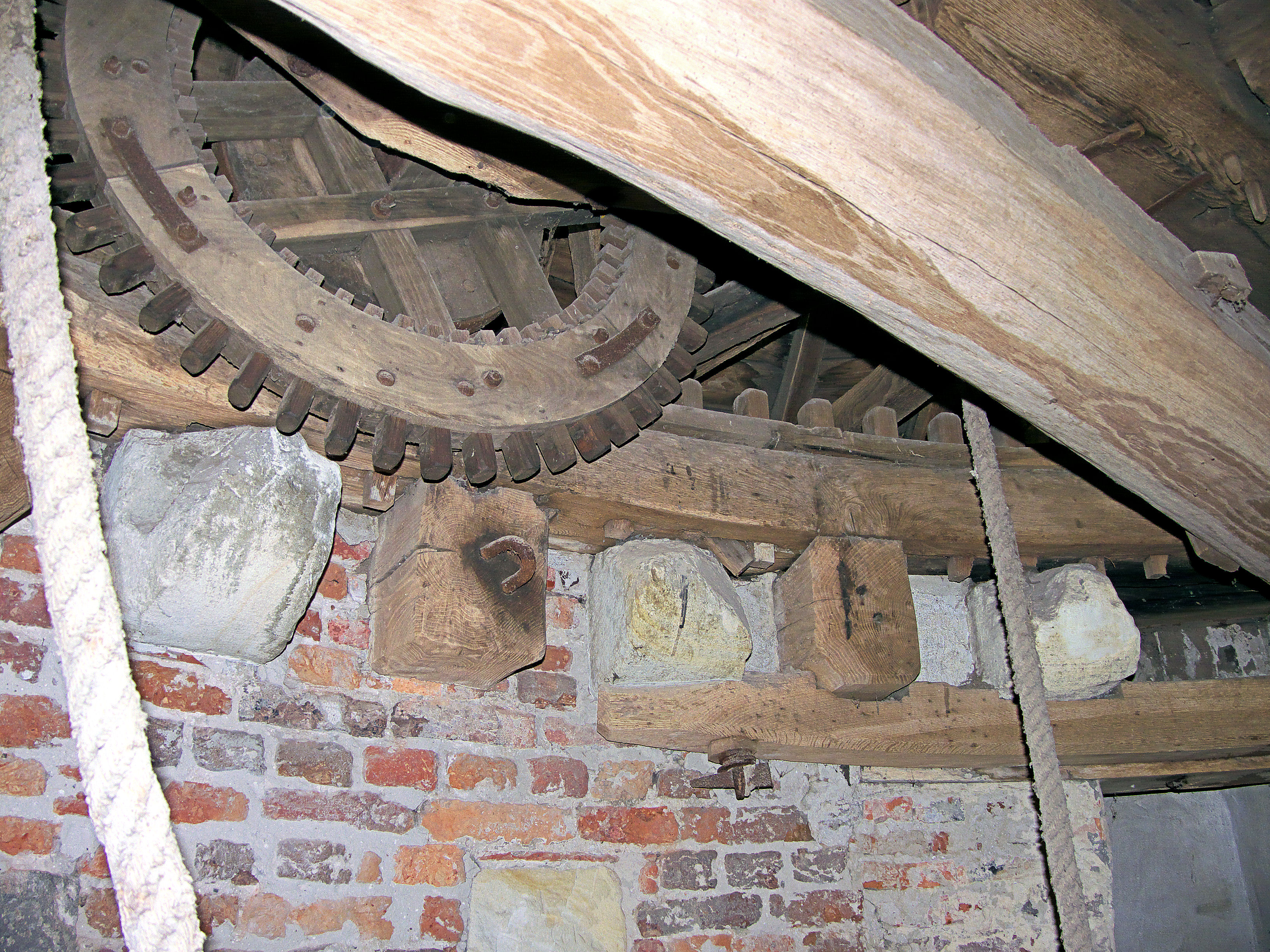 Molen Turmwindmühle Werth, Duitsland kruiwerk: varkenswiel, tandkrans en kardoezen